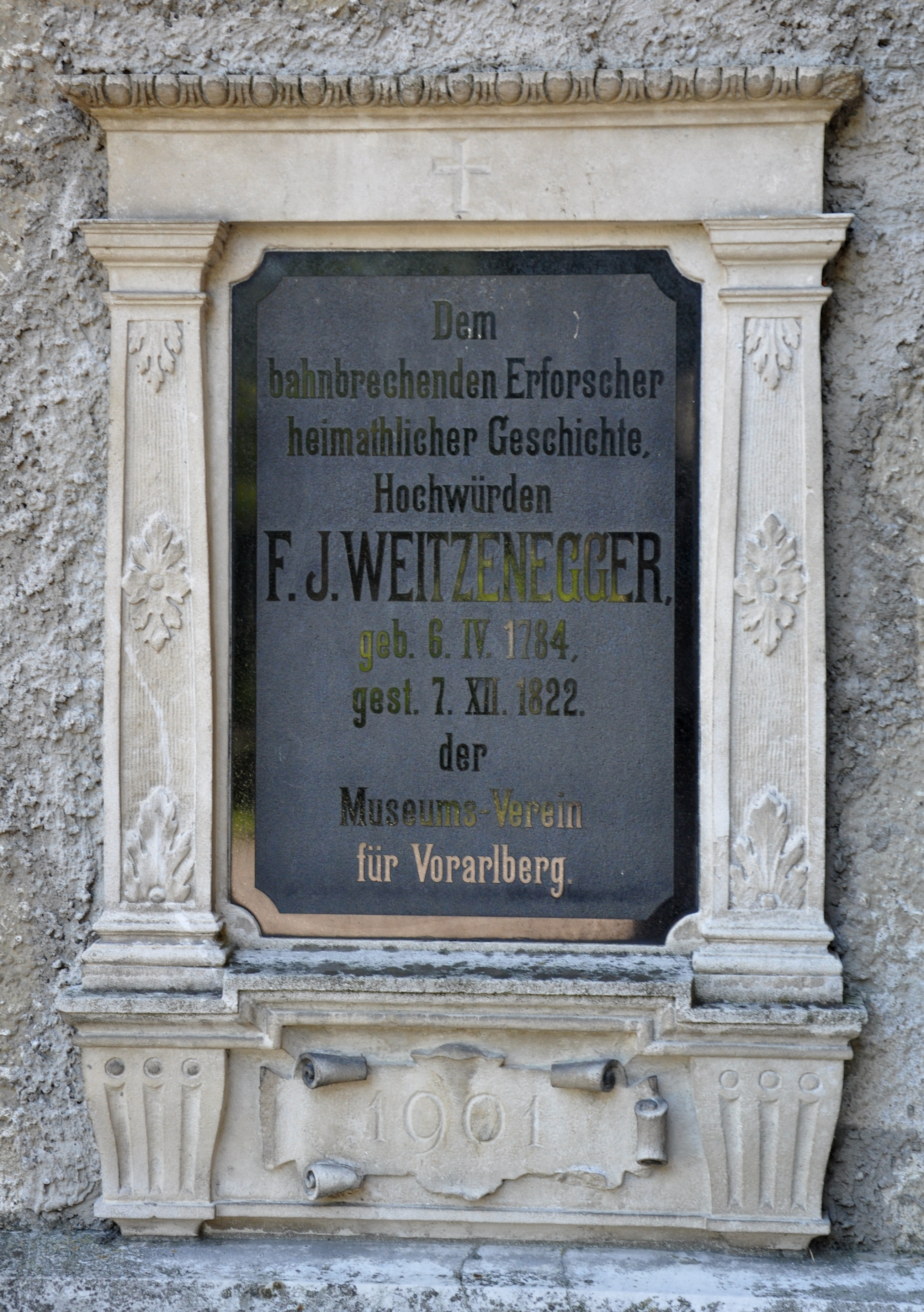 Bregenz, Pfarrkirche St. Gallus, Gedenktafel des Museumsvereins für den Heimatforscher F. J. Weitzenegger (Franz Josef Waitzenegger; 1784-1822)